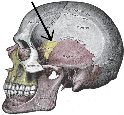 módosítva